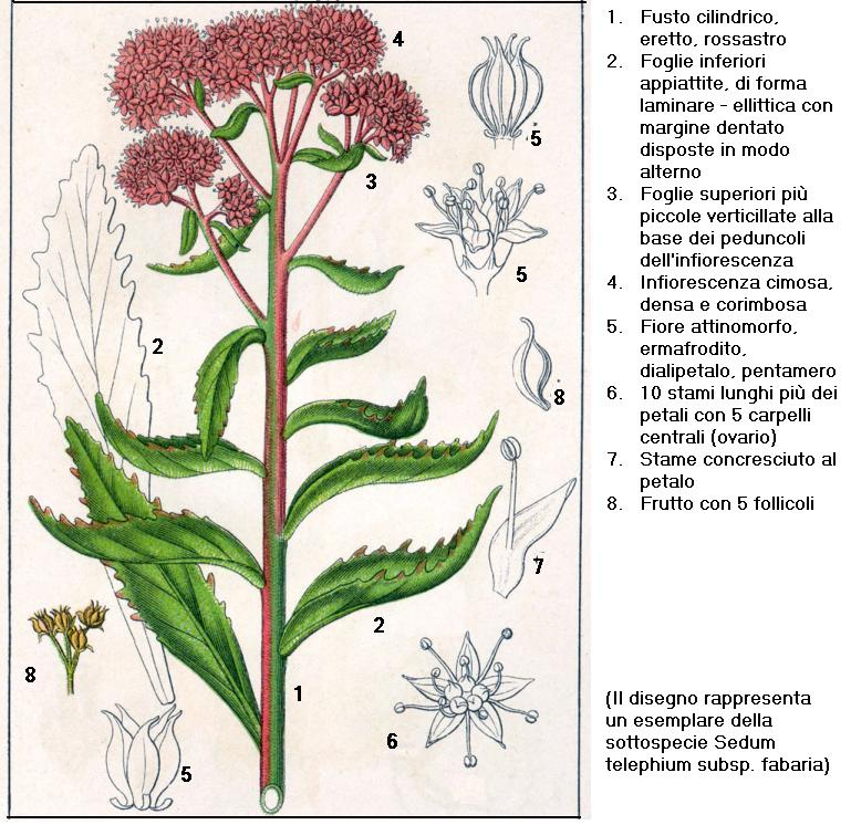 Sedum telephium